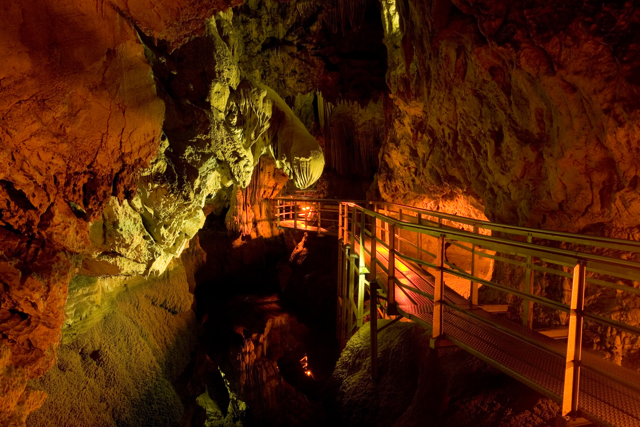 Σπήλαιο Λιμνών«Σπήλαιο Λιμνών»